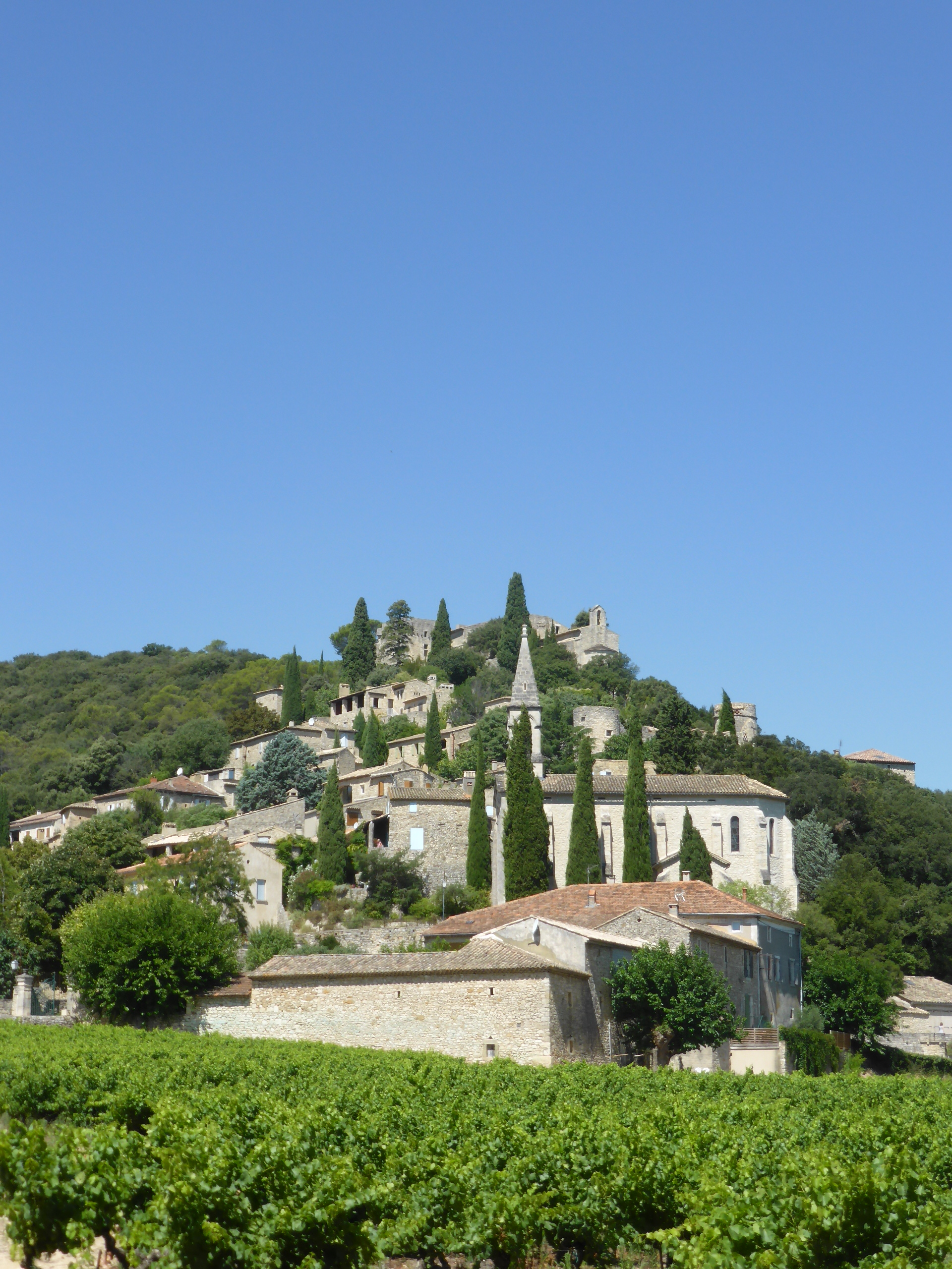 Vue du village de la Roc sur Cèze dans le Gard